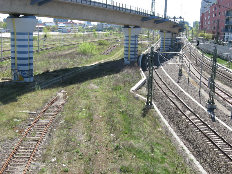 "Überflieger" der Strecke Wedding - Berlin Hauptbahnhof über Berlin Hamb u Lehrt Bf, von der Perleberger Brücke aus fotografiert